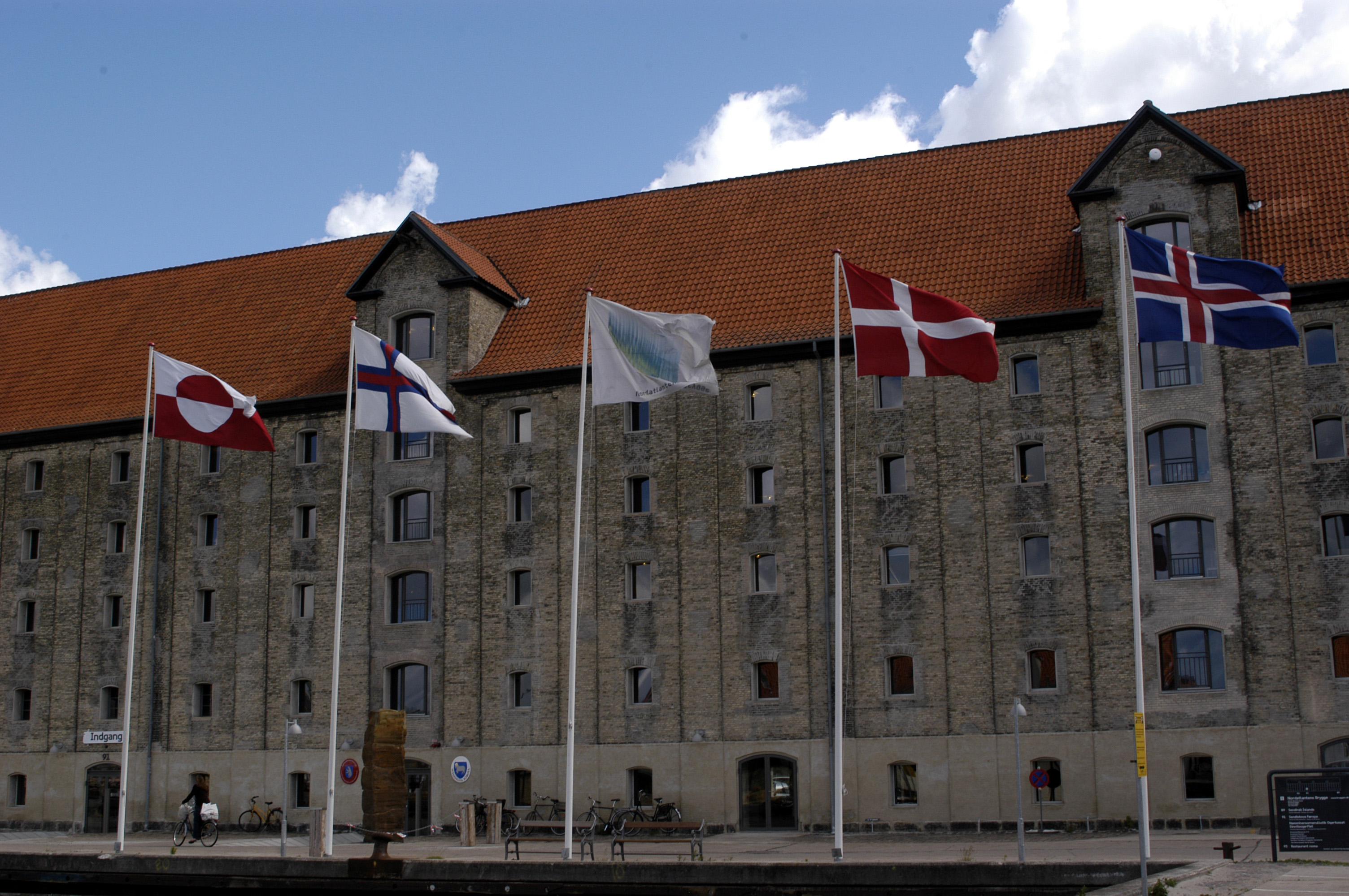 Flaggor utanför Nordatlantens brygge